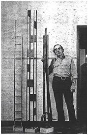 Aurelio Sandonato pose à côté de l'oeuvre qui lui fit gagner le premier prix Arts Figuratives en 1978, dans le cadre de la Semaine Italienne de Montréal